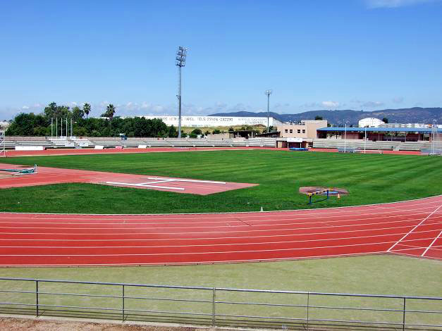 Instalaciones deportivas municipales Fontanar, en Córdoba (España).